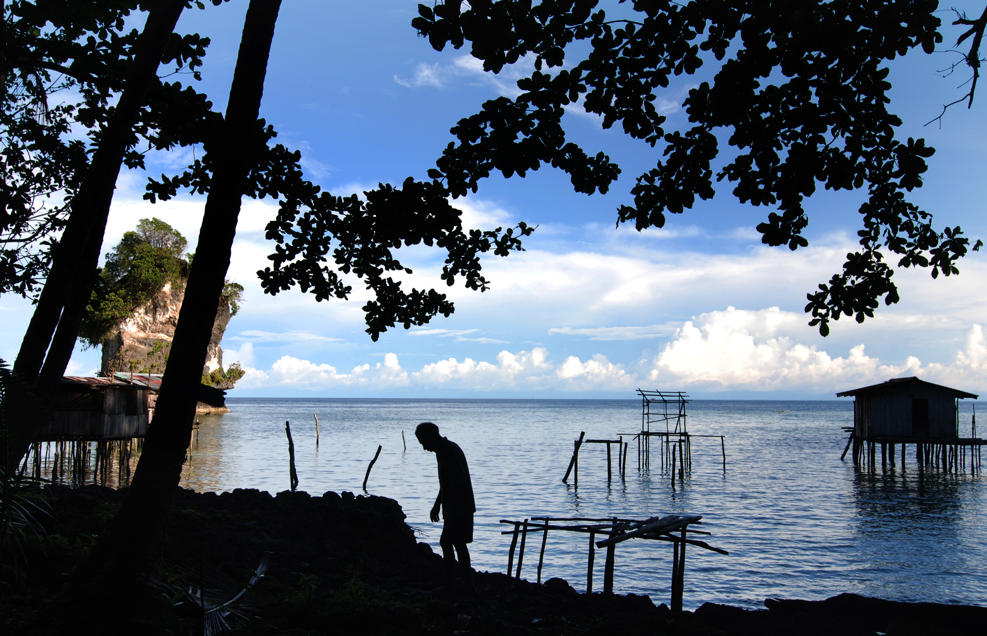 Padwa adalah area kuburan di tebing Suku Biak